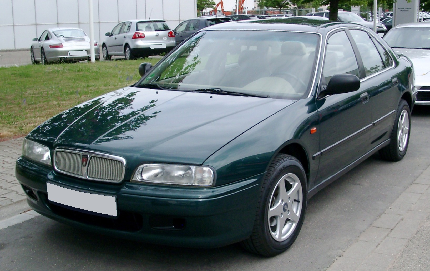 Rover 618si